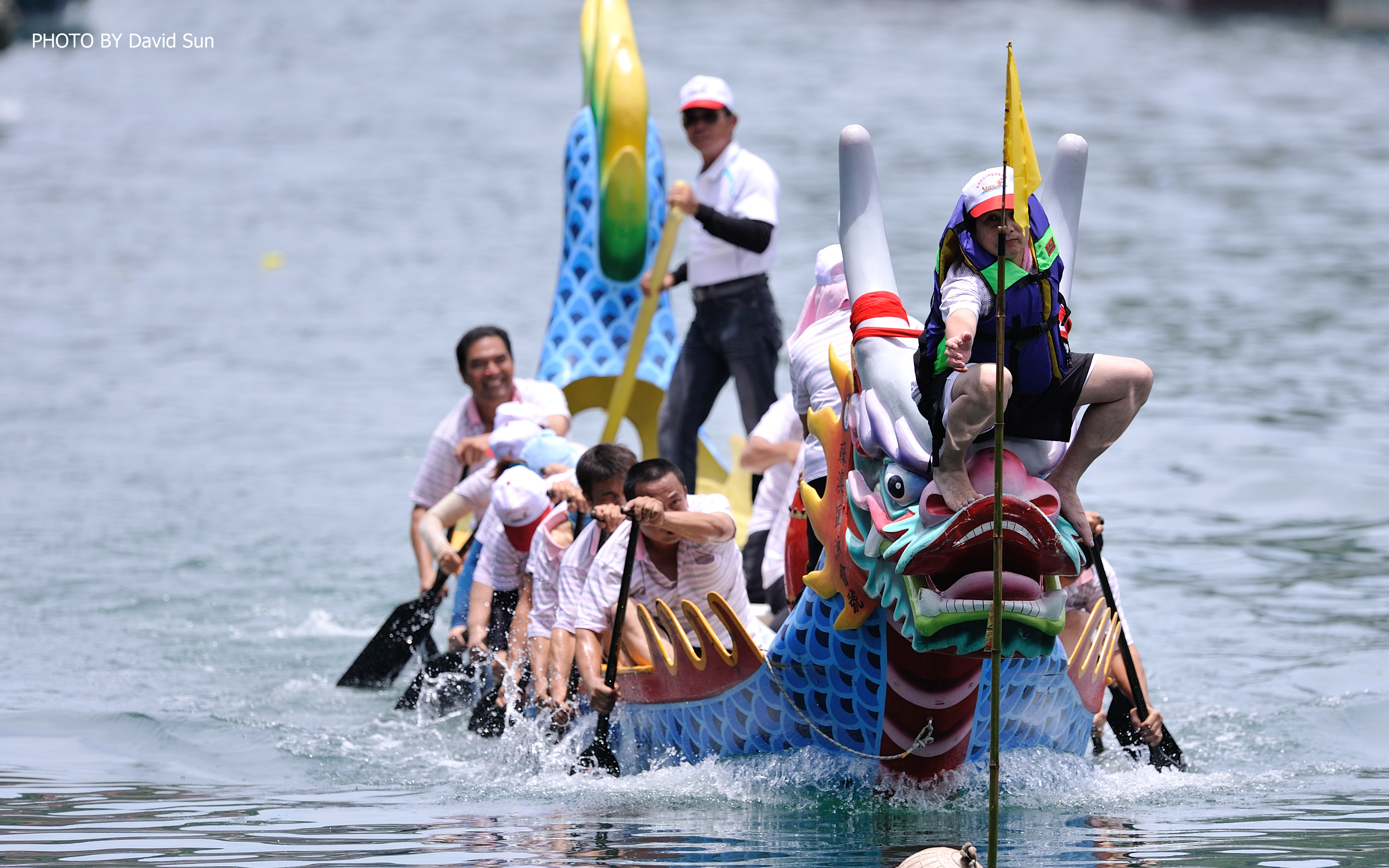 中文（台灣）: 南方澳內埤海邊的端午龍舟。